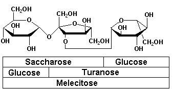 selbst gezeichnet ...